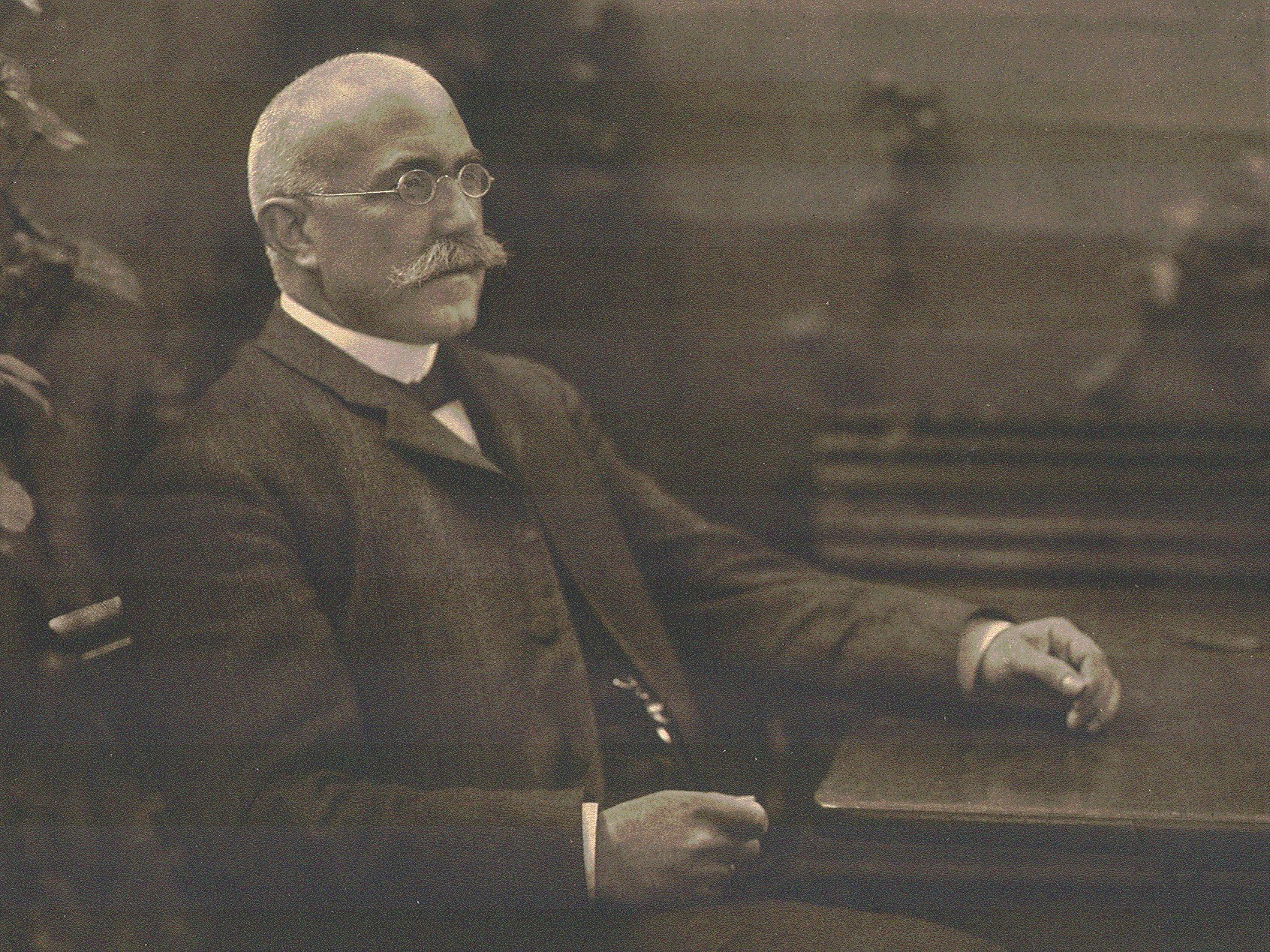 Gustav Schiefler (1857-1935) Hamburger Landgerichtsdirektor, Kunstschriftsteller, Kunstsammler und Mäzen